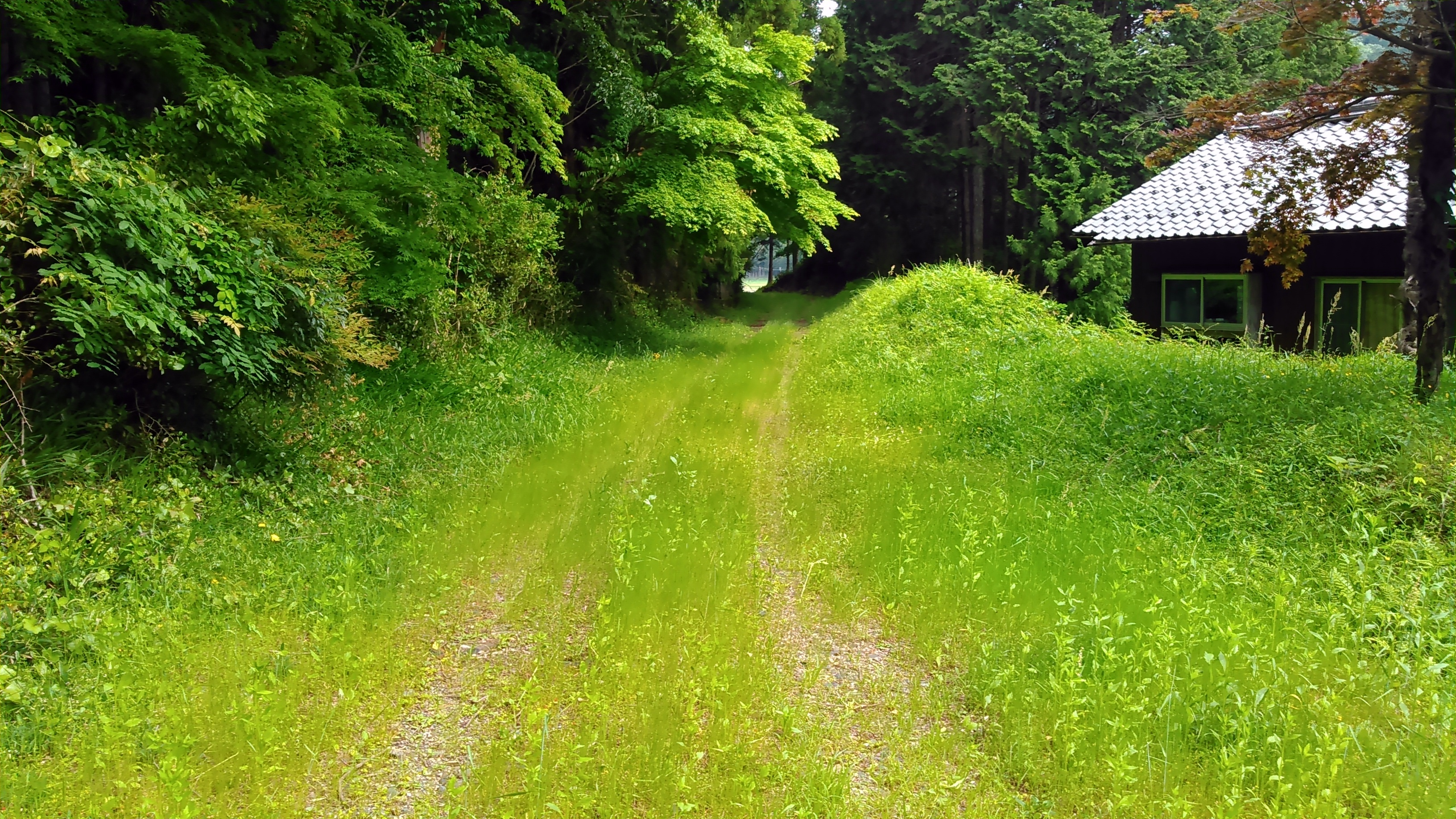 名鉄谷汲線・結城駅跡地（盛土部分）。 社務所の北側に位置した。